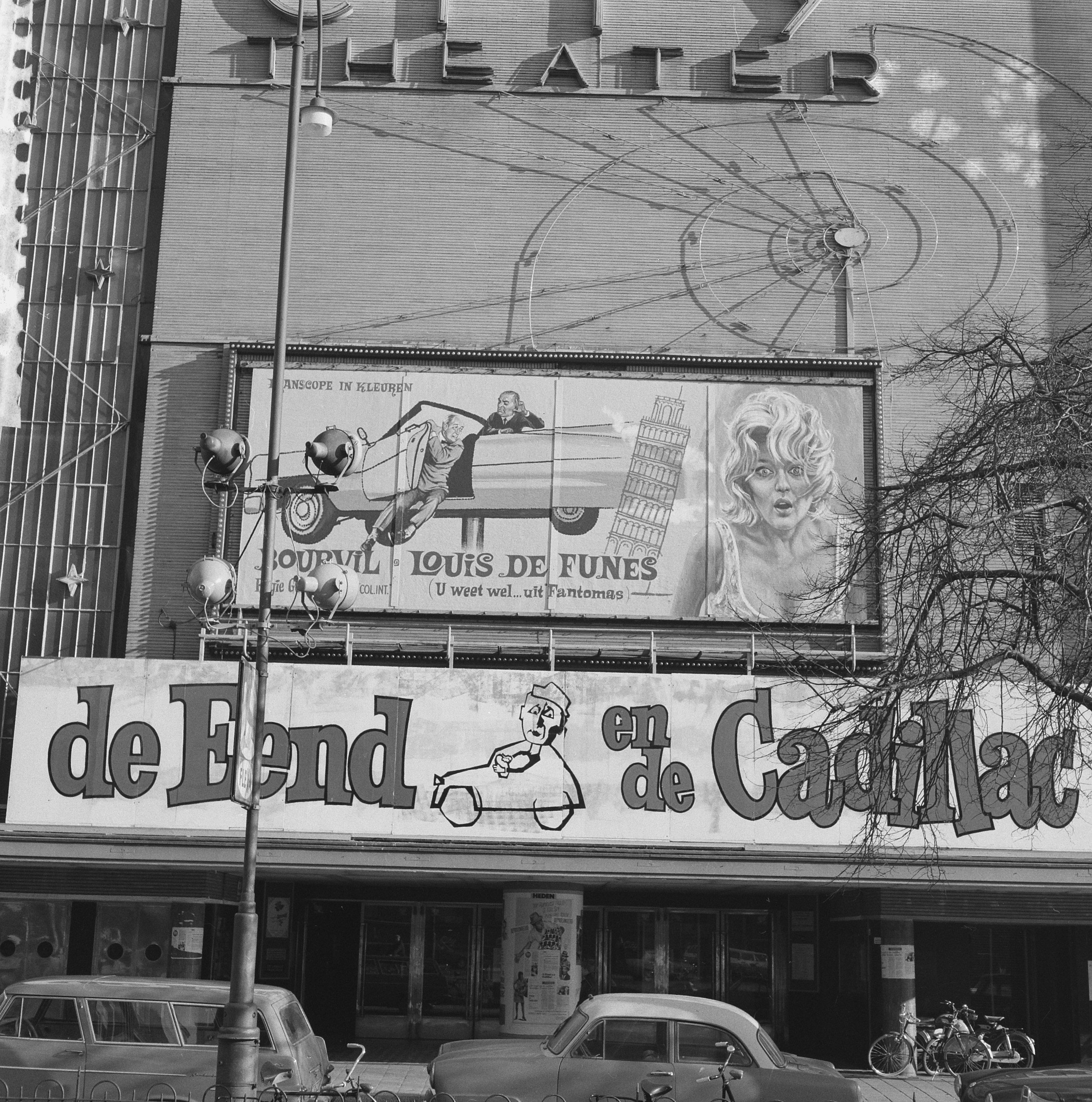 Le film français Le Corniaud, avec Louis de Funès et Bourvil, à l'affiche d'un cinéma néerlandais, en novembre 1965. Photographie issue des Archives nationales du Pays-Bas (Nationaal Archief).